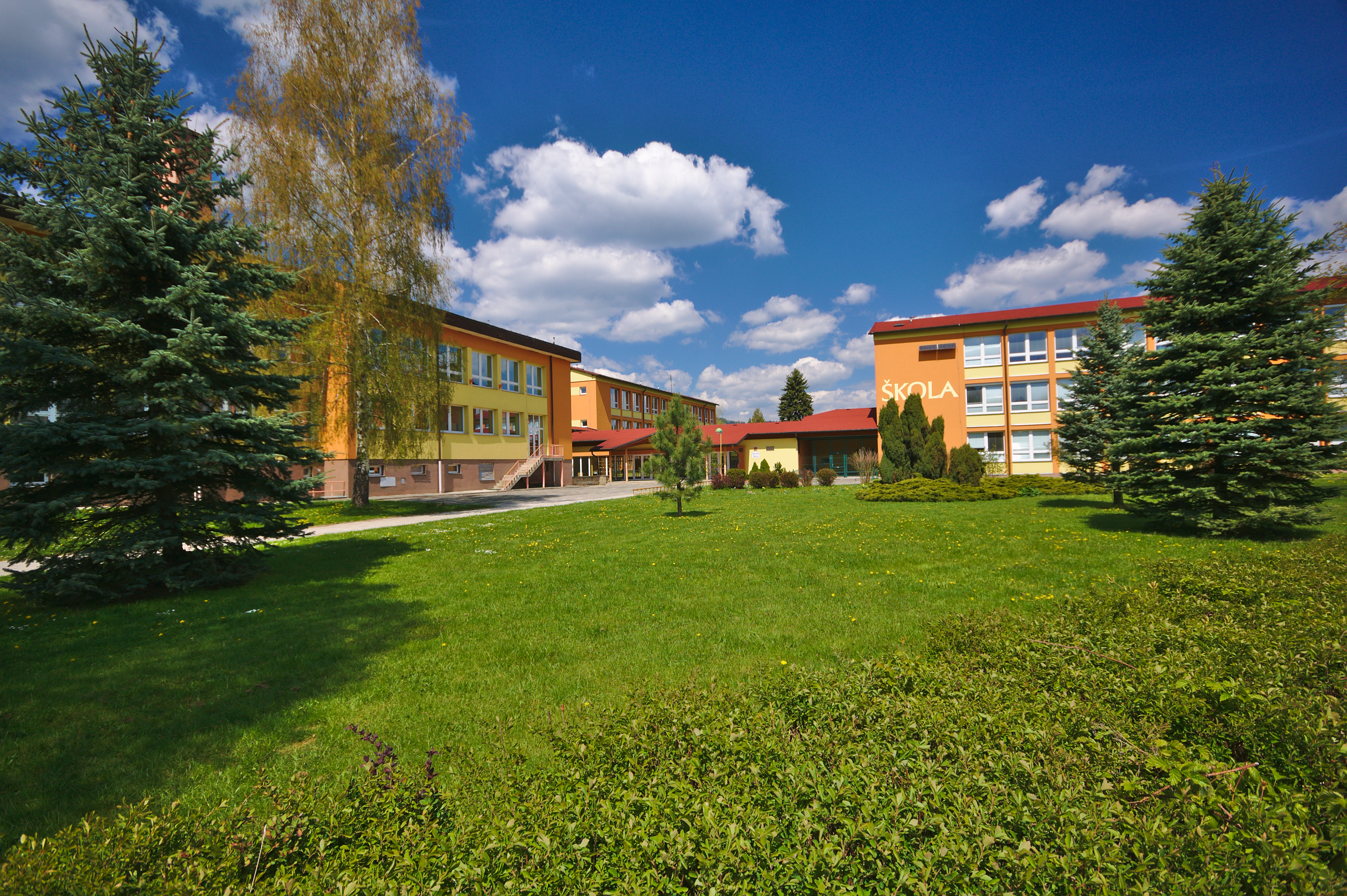 Škola, Horní Lideč, okres Vsetín